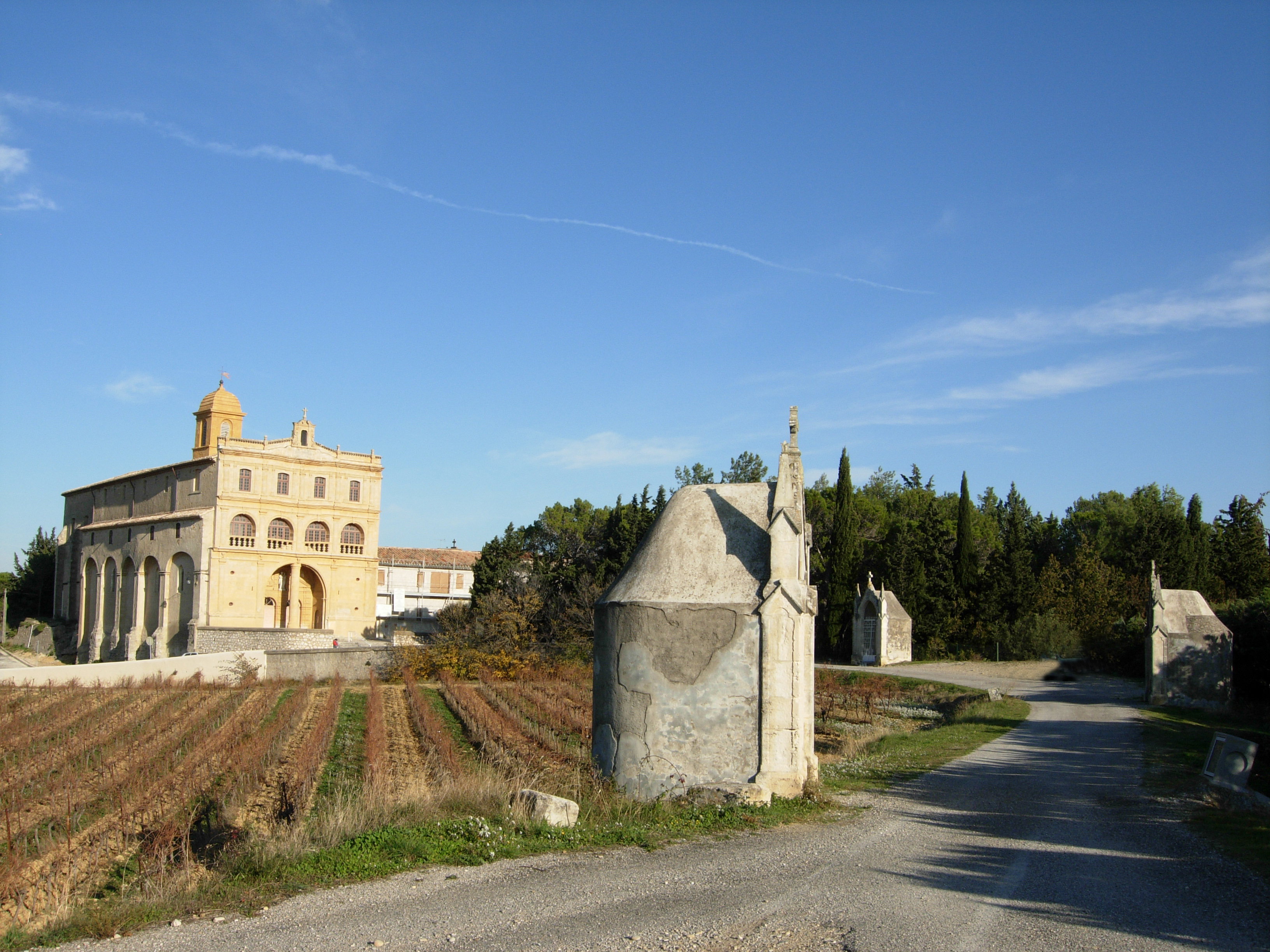 Gignac (Hérault) - Notre-Dame de Grâce et oratoires.